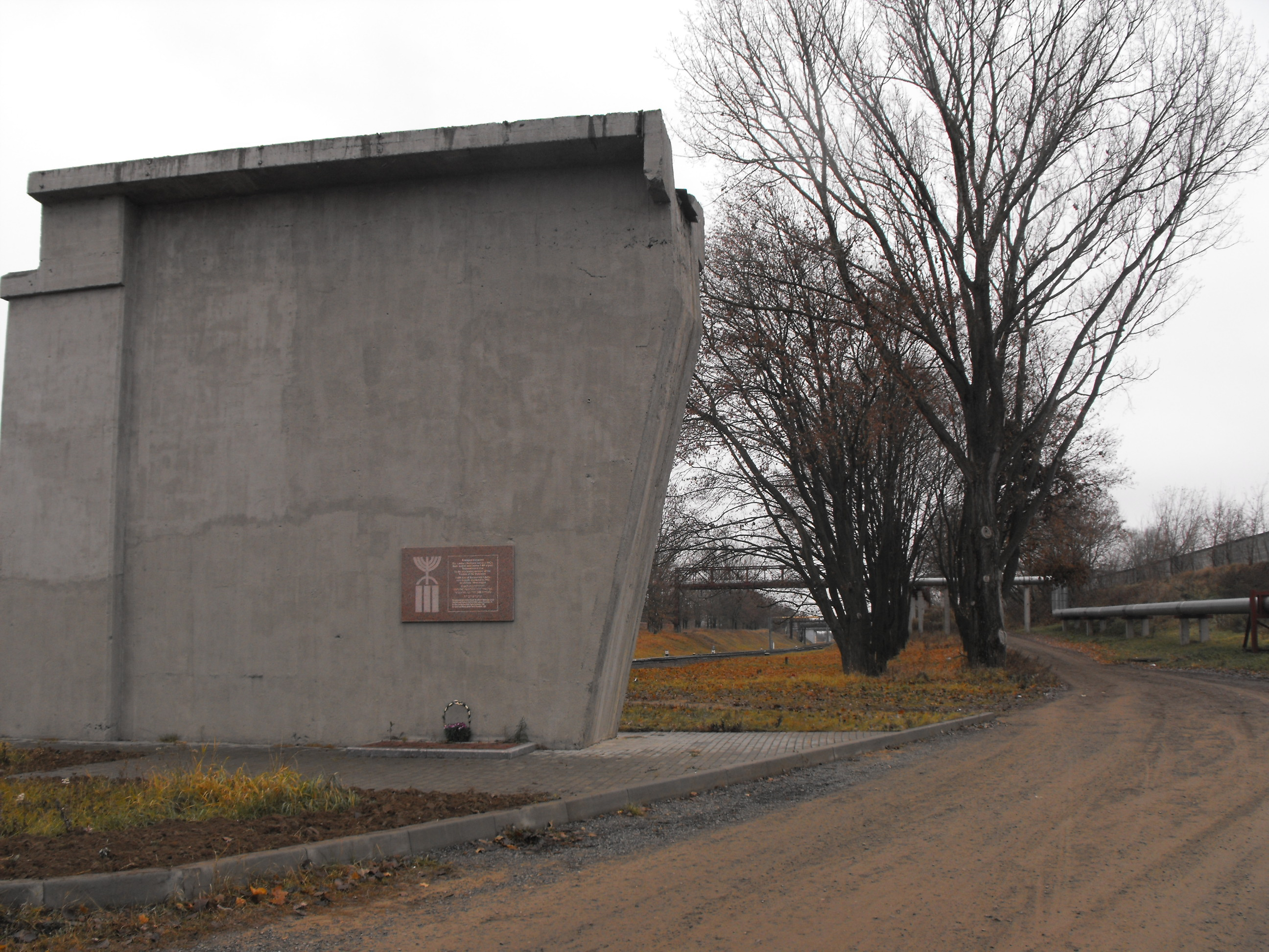 Мемориальная доска в память 3 400 евреям - узникам Барановичского гетто, убитым нацистами недалеко от этого места 4 марта 1942 года. Открыта 8 июля 2009 г. на ул. Промышленной в районе «Зеленого моста».